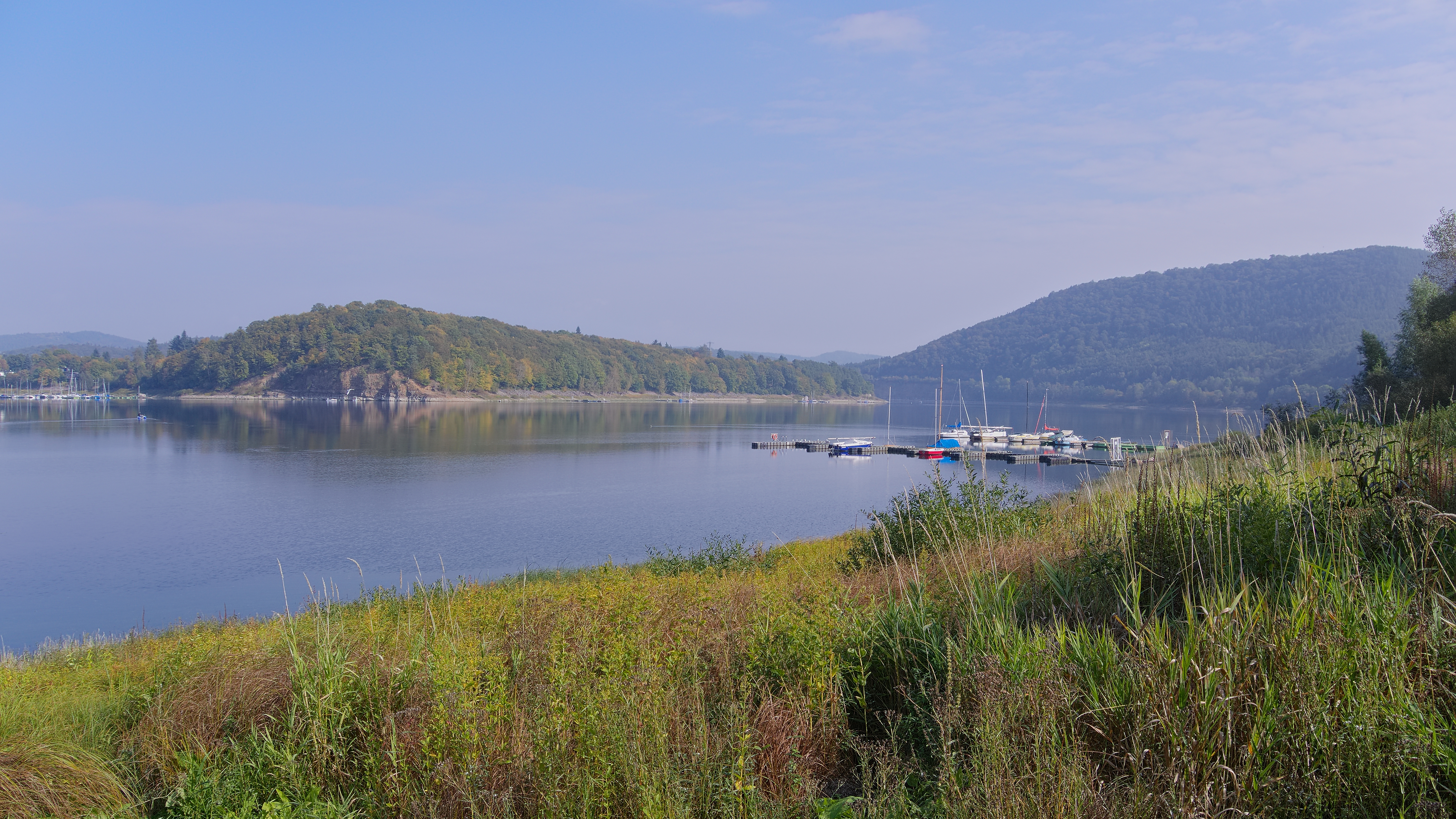 Blick von Bringhausen über den Edersee auf die Südwestspitze der Halbinsel Scheid. Aufgenommen in Edertal-Bringhausen, Hessen, Deutschland.